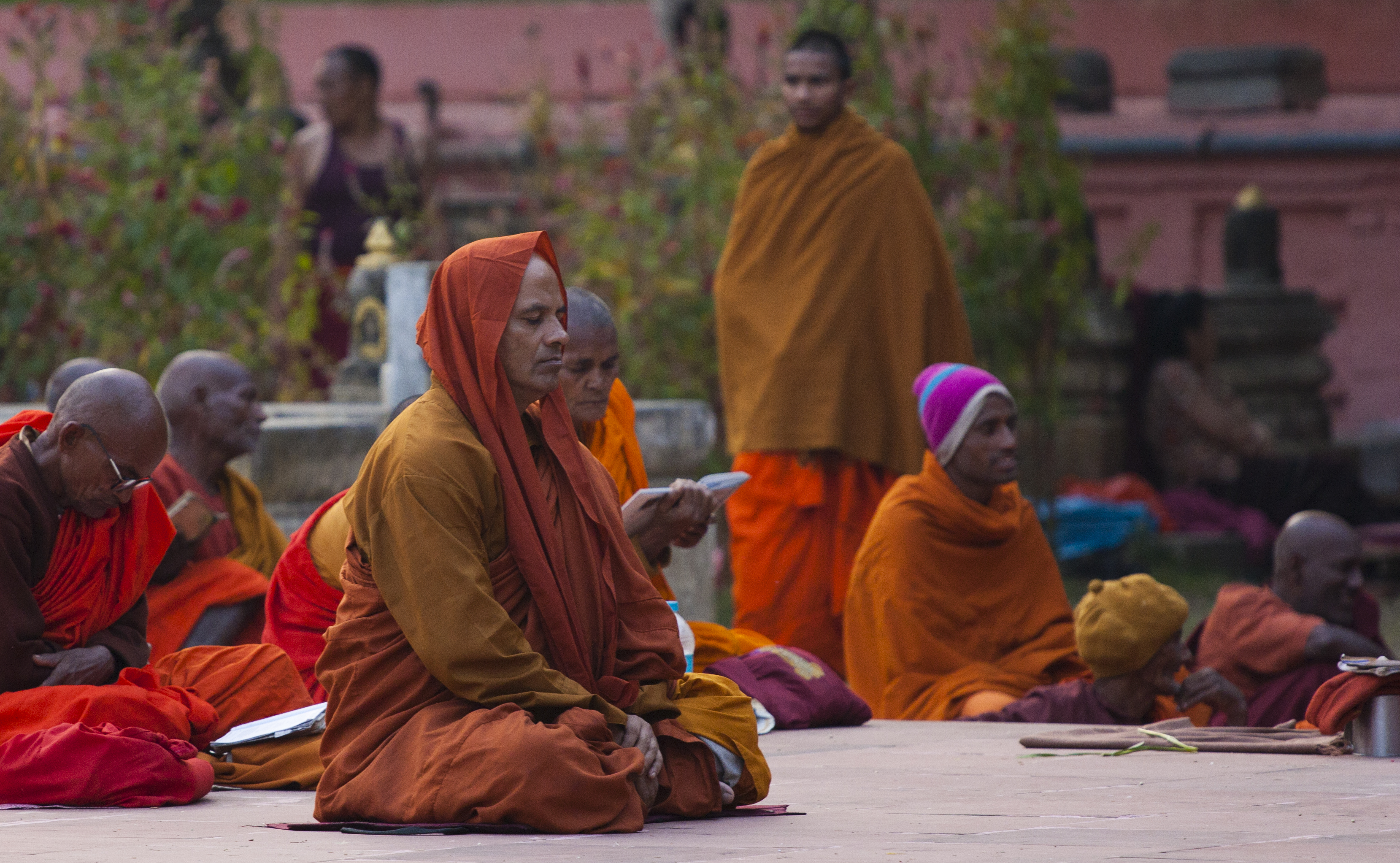 Buddhist Man Meditating in Bodhgaya, Bihar, India